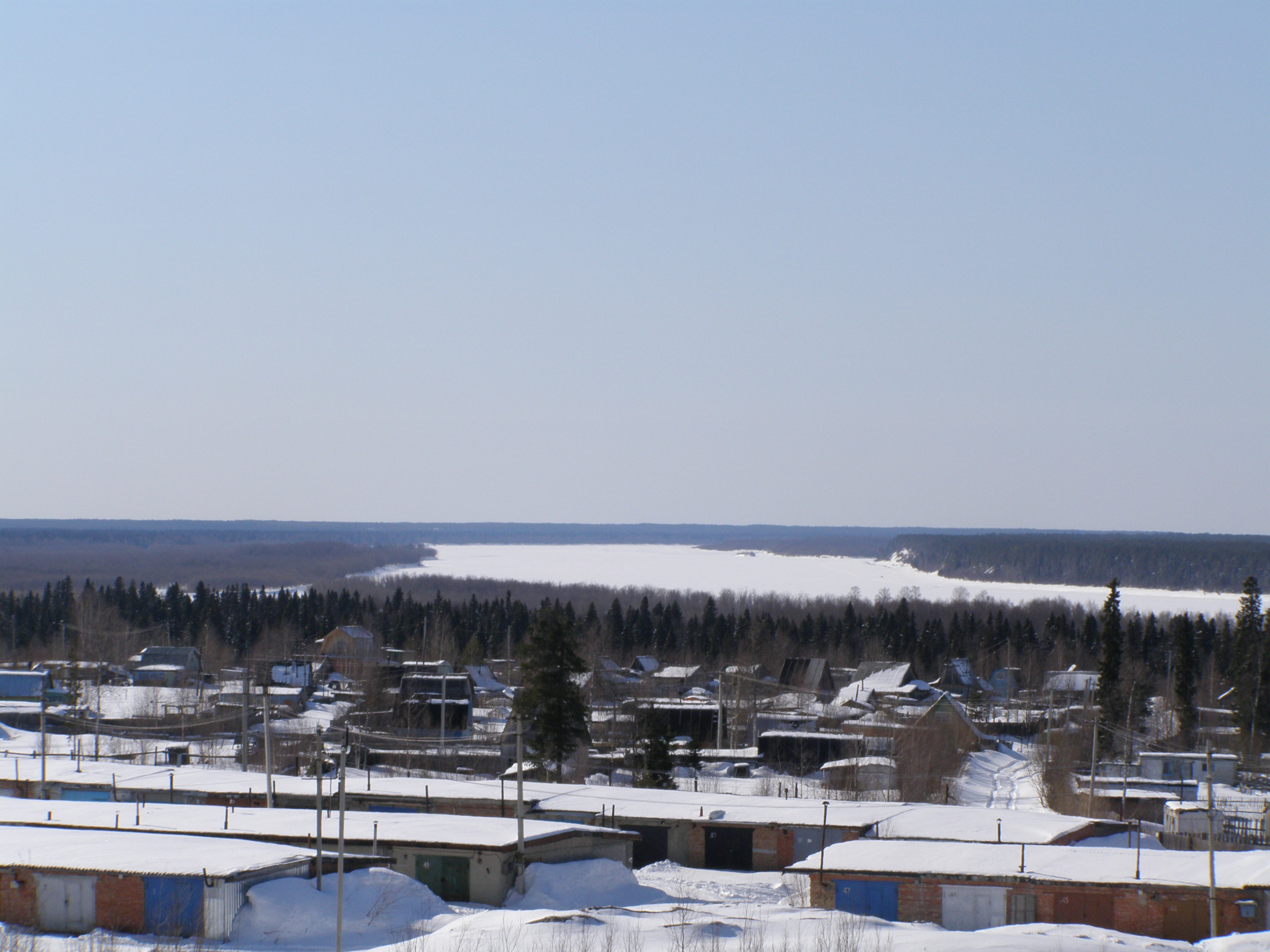 Vuktyl